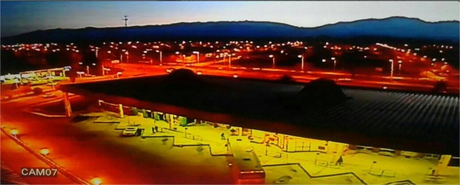 En esta imagen se observa a la Ciudad de Eugenio Bustos desde la altura.